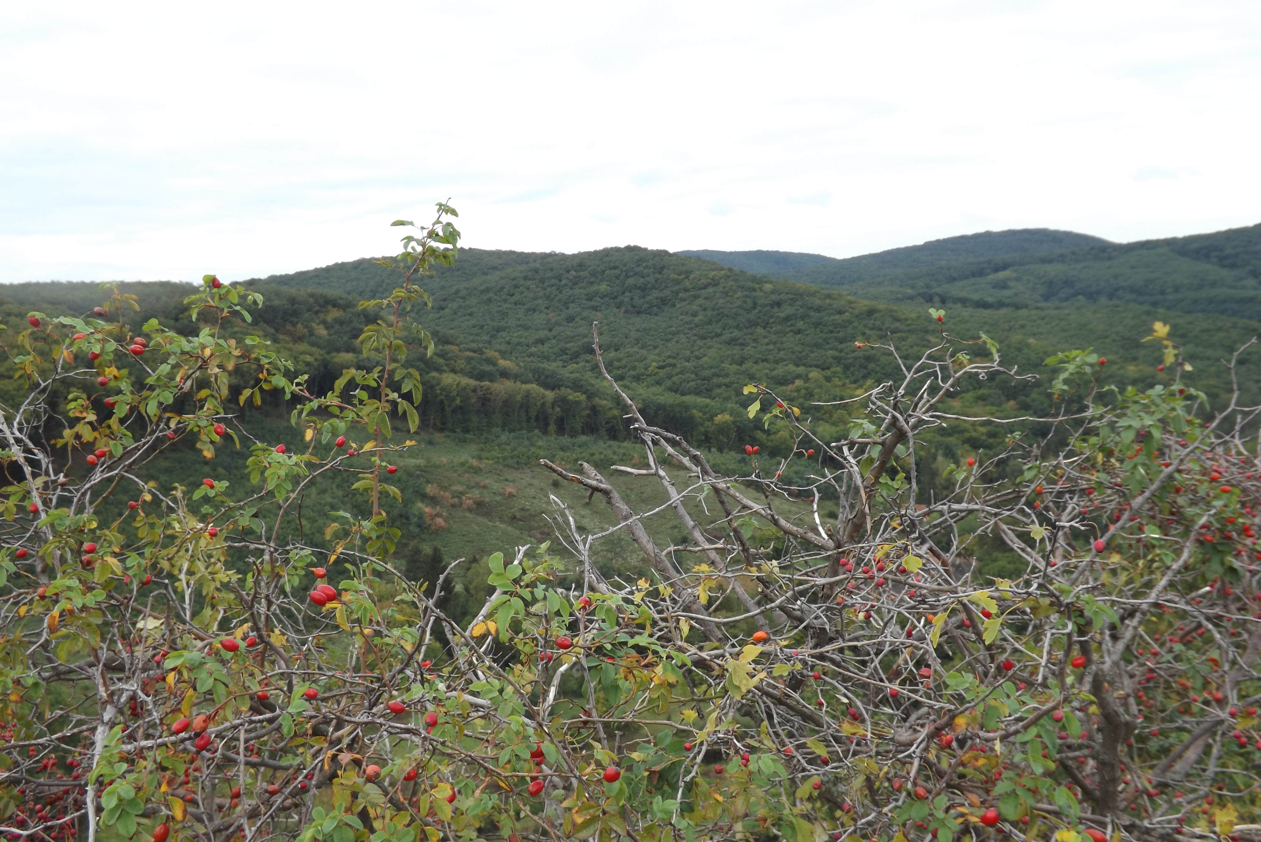 Sály, Latortető